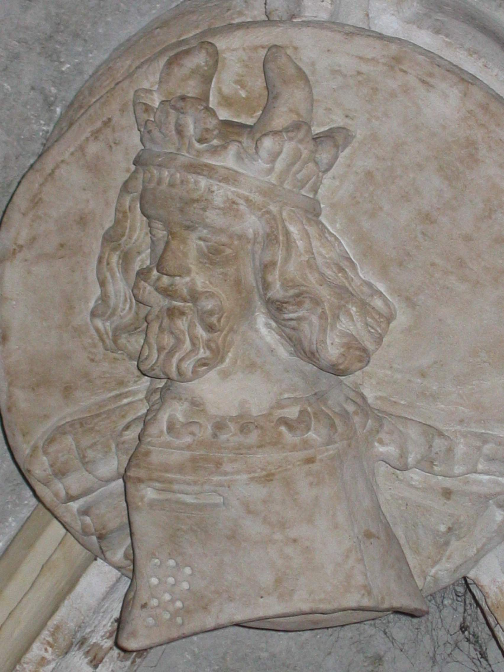 Kazimierz Wielki na zworniku w sali rycerskiej kamienicy hetmańskiej w Krakowie author-Maciej Szczepańczyk User:Mathiasrex